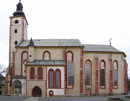 Obrázok zobrazuje Farský kostol. Je to panoráma zložená zo 4 obrázkov, ktorej autorom som ja, Daniel Pohanka.